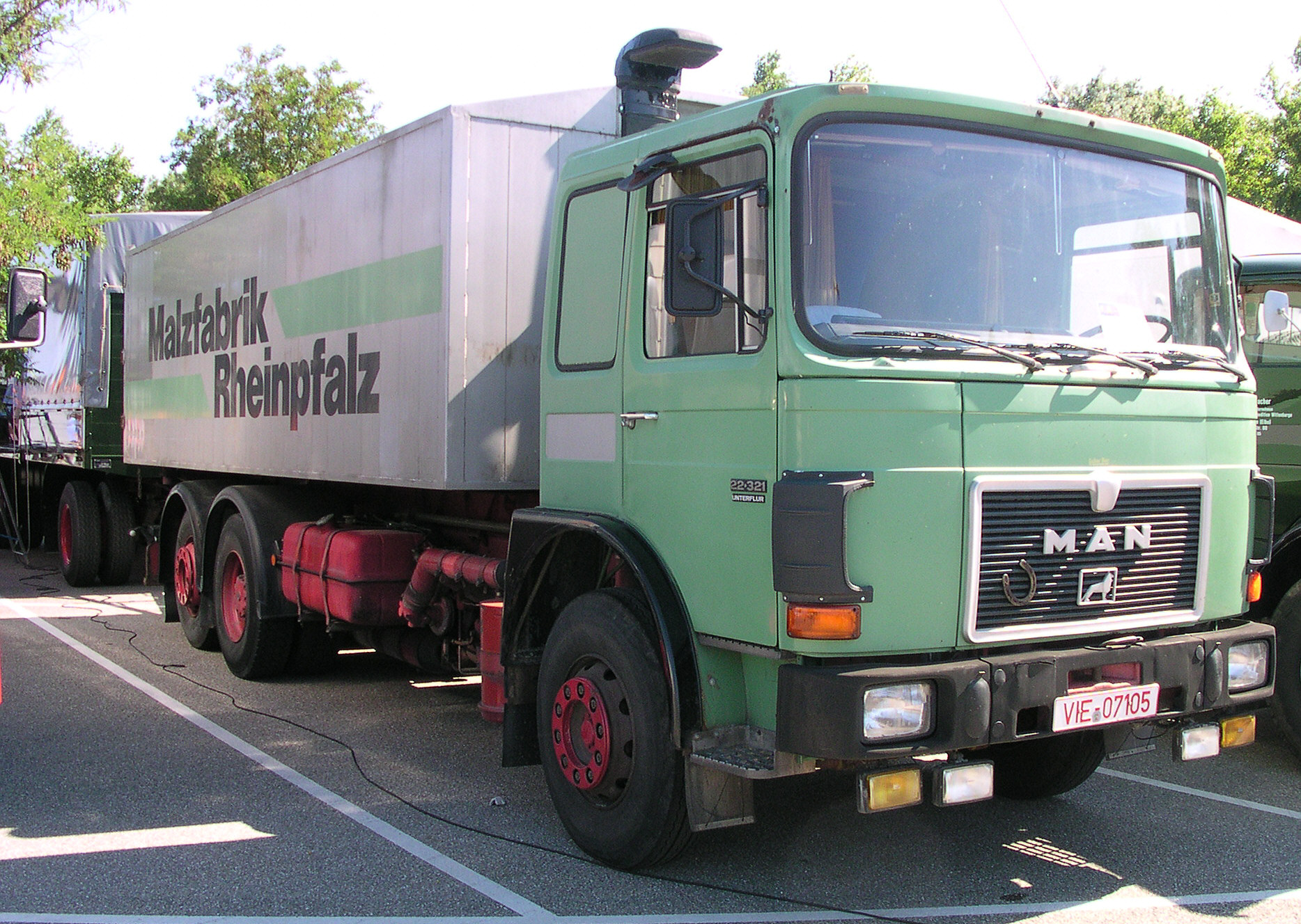 MAN 22.321 UNL, Baujahr 1981, 236 kW (320 PS) in Wörth am Rhein beim Oldtimer-Treffen bei Daimler-Chrysler